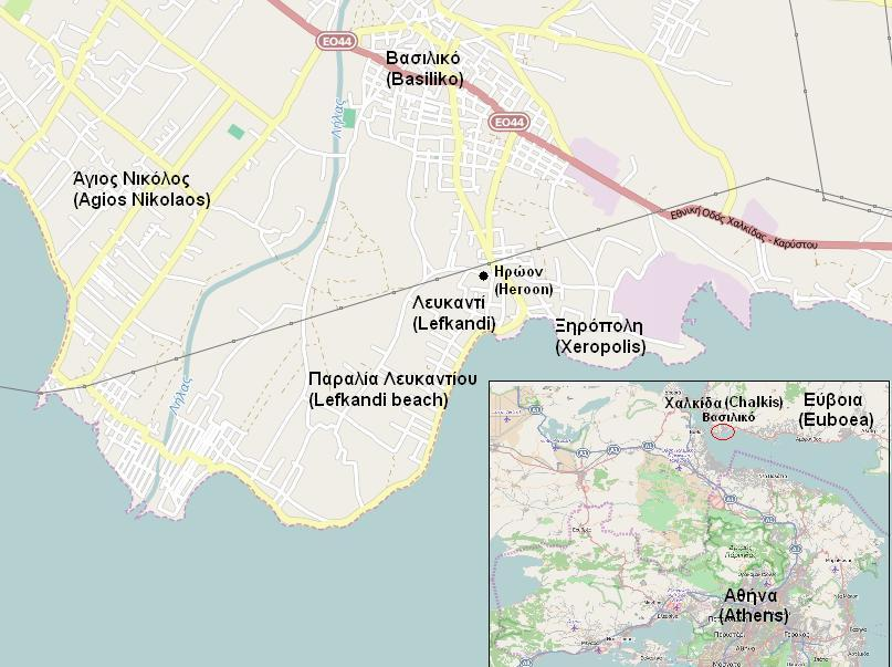 Λευκαντί